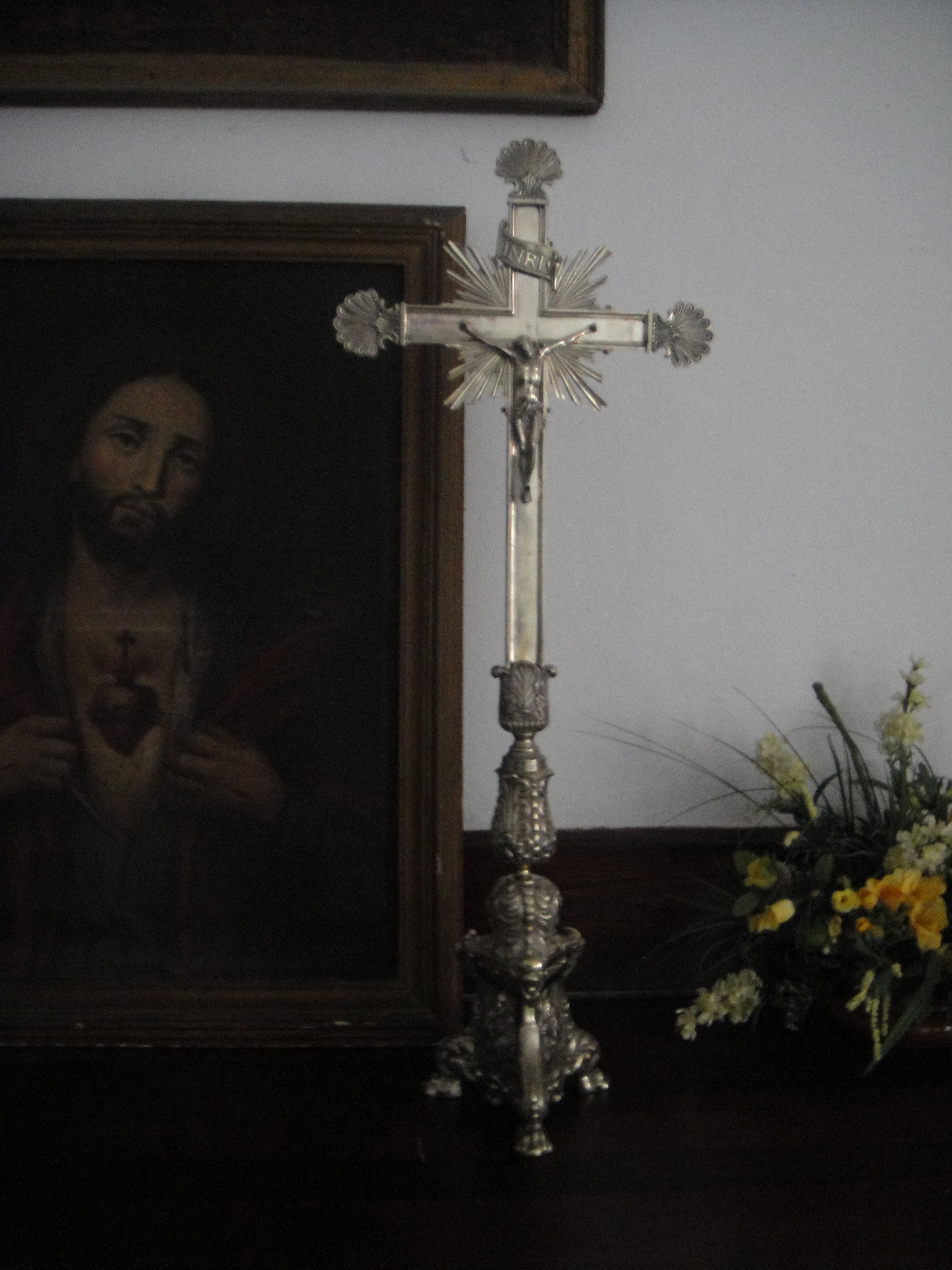 Cruz de altar de plata y Sagrado Corazón de Jesús en la sacristía de la iglesia de Nuestra Señora del Castillo de Fuente Obejuna, provincia de Córdoba, (España).